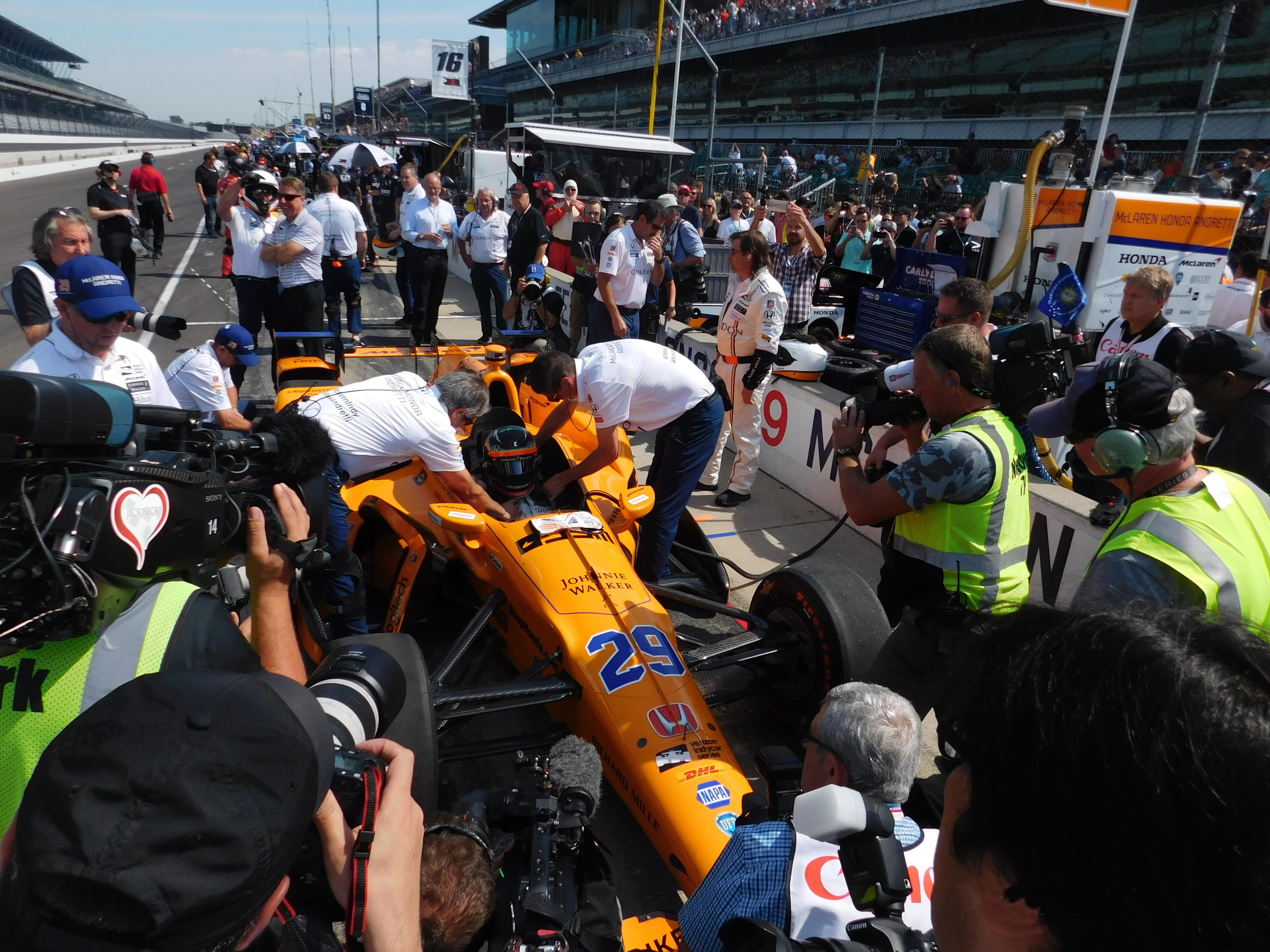 fernando alonso carb day